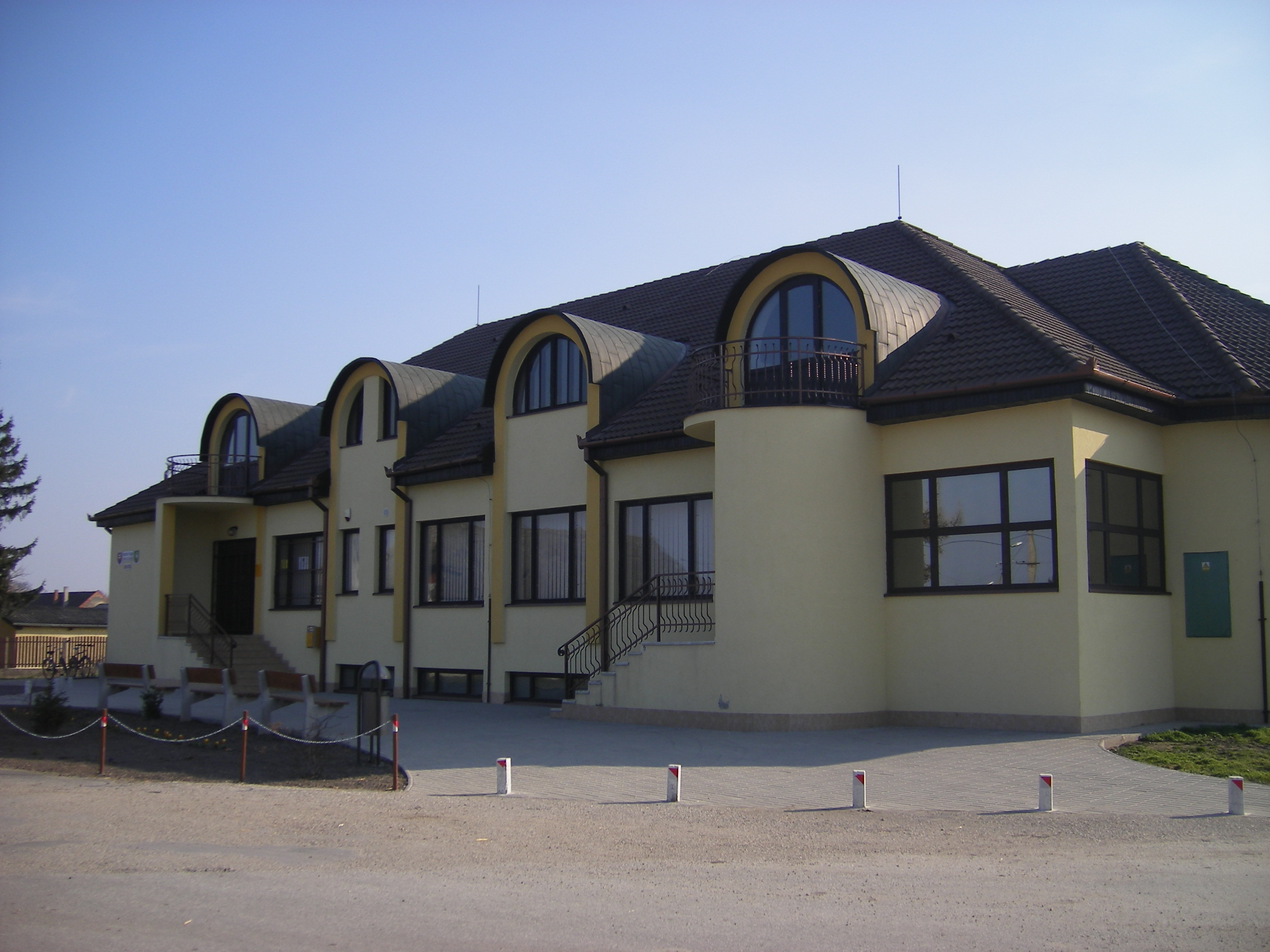 Gellér, a községi hivatal épülete.